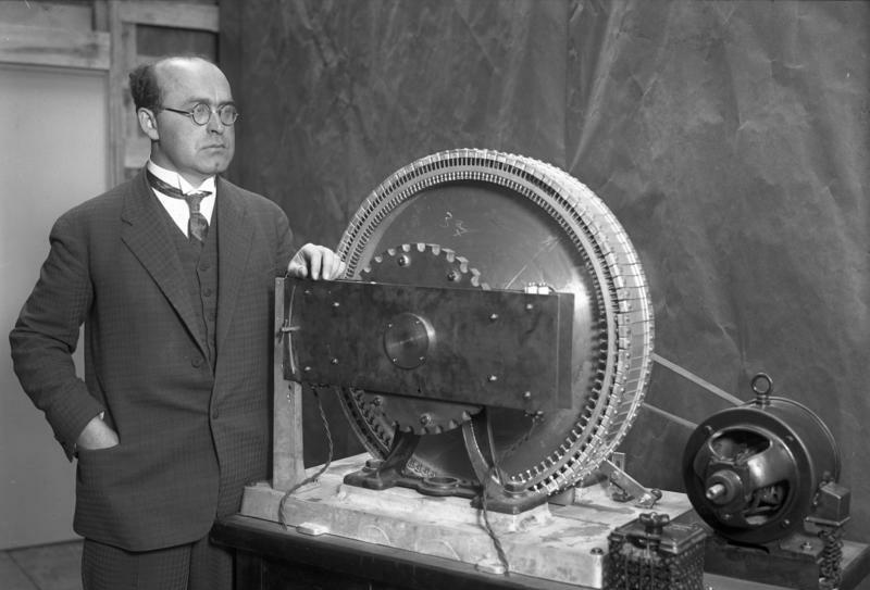 Der berühmte deutsche Radio-Forscher Prof. Carolus erhält die Heinrich Hertz-Medaille! Prof. Dr. Carolus [August Karolus] an seinem Fernseher, für dessen Vervollkommnung er die Heinrich Hertz-Medaille erhielt.